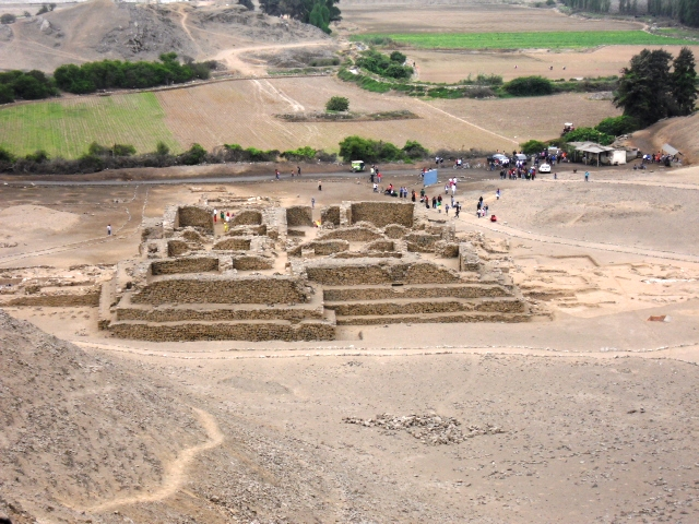 Pirámide principal del sitio arqueológico El Paraiso (construido entre el 2.300 a.C. y el 1.400 a.C., periodo Arcaico Tardío) ubicado en el distrito de San Martín de Porres, Lima, Perú.